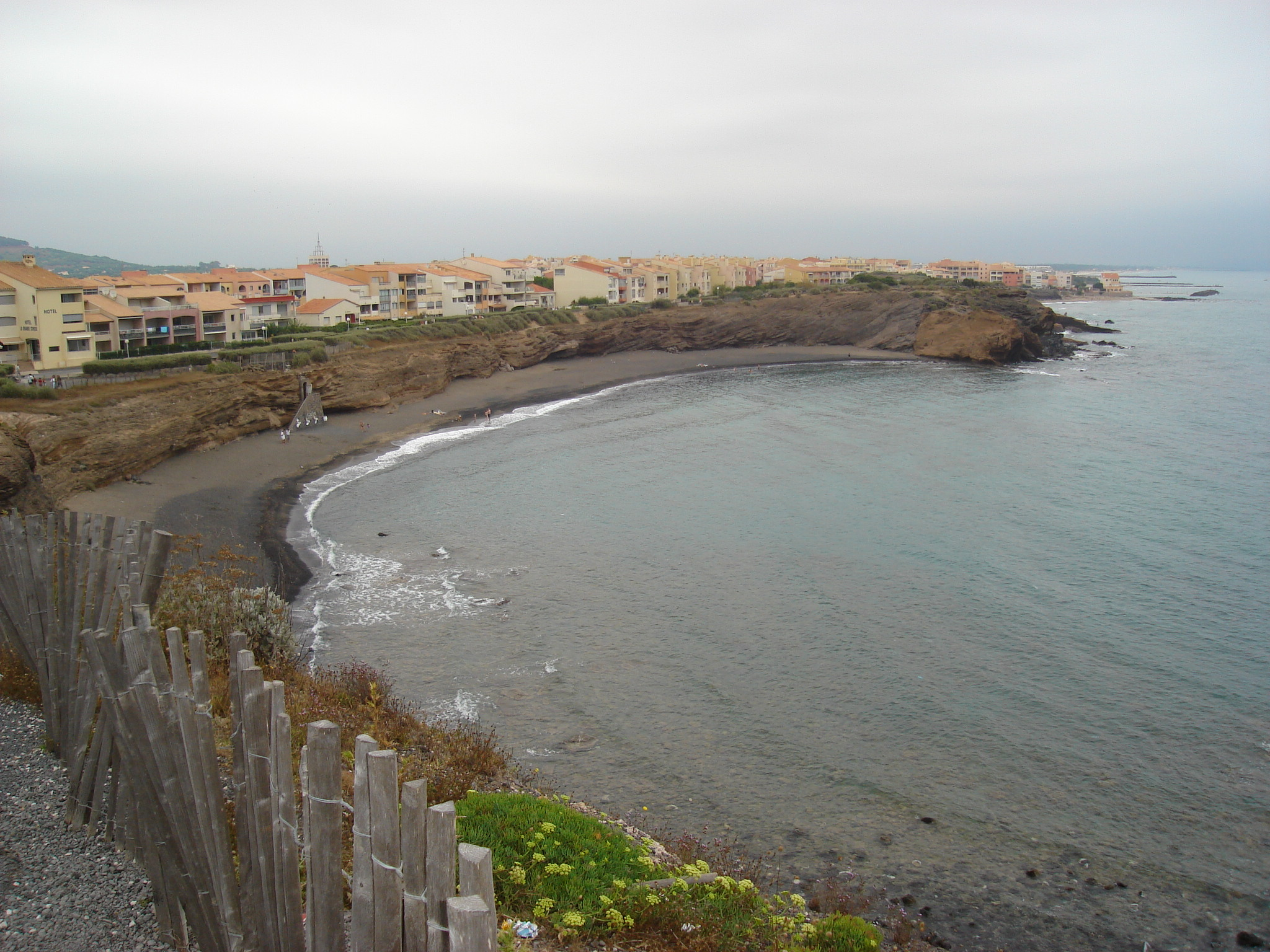 Cap d'Agde (Hérault) - Plage de la Grande-Conque